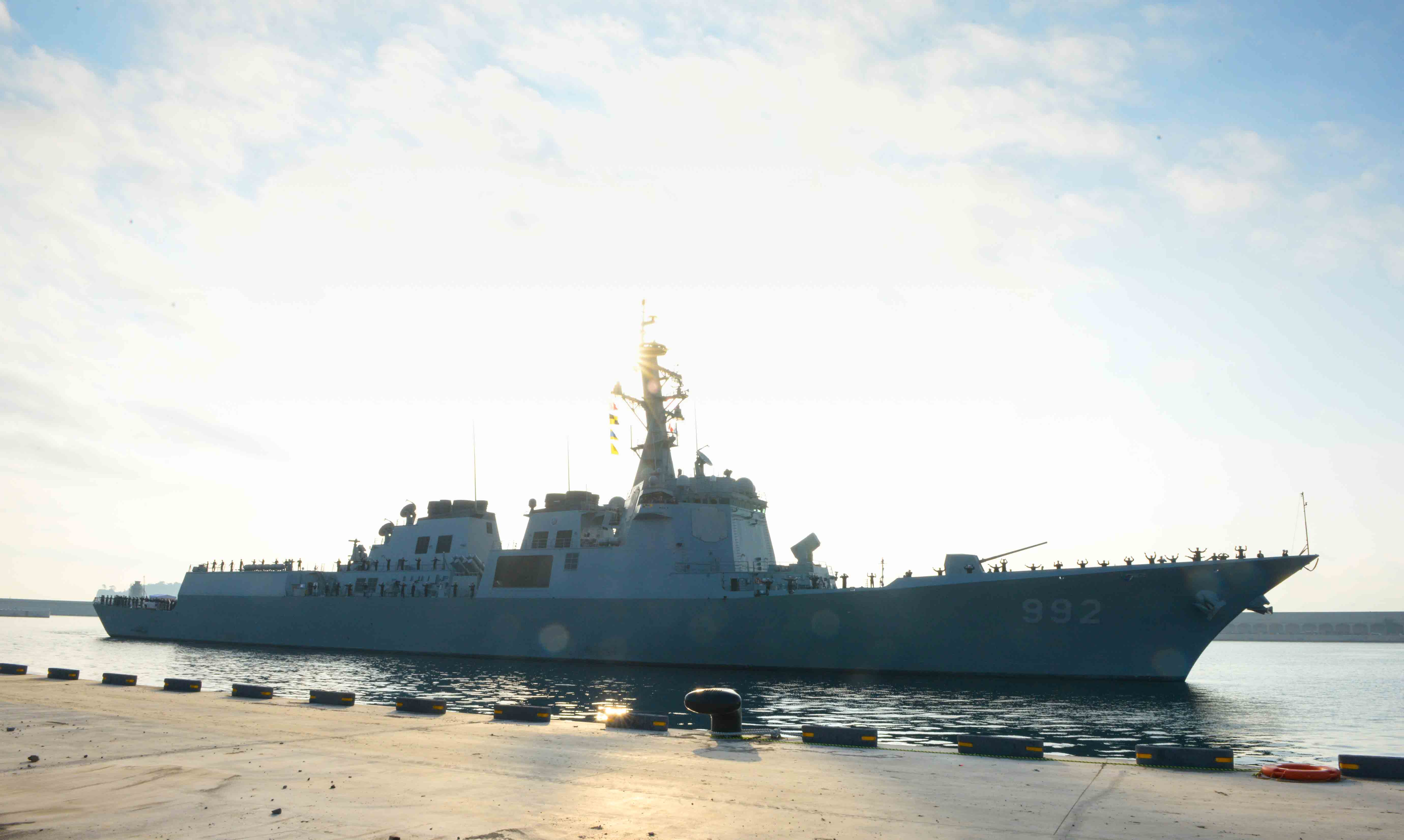 2015.12.22. 제주민군복합항 7전단 전개